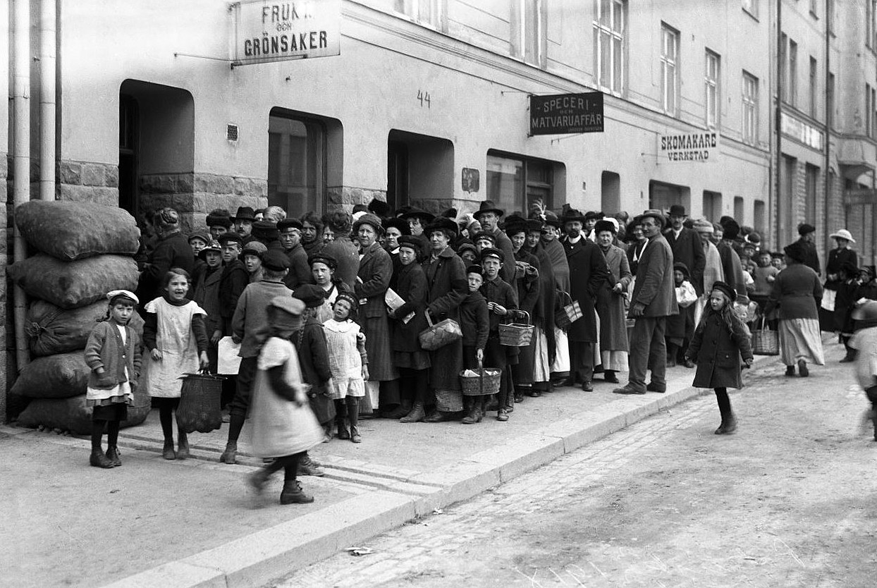 Potatiskö år 1917 vid Södermannagatan 44. År 2012 är adressen till denna plats Södermannagatan 50.